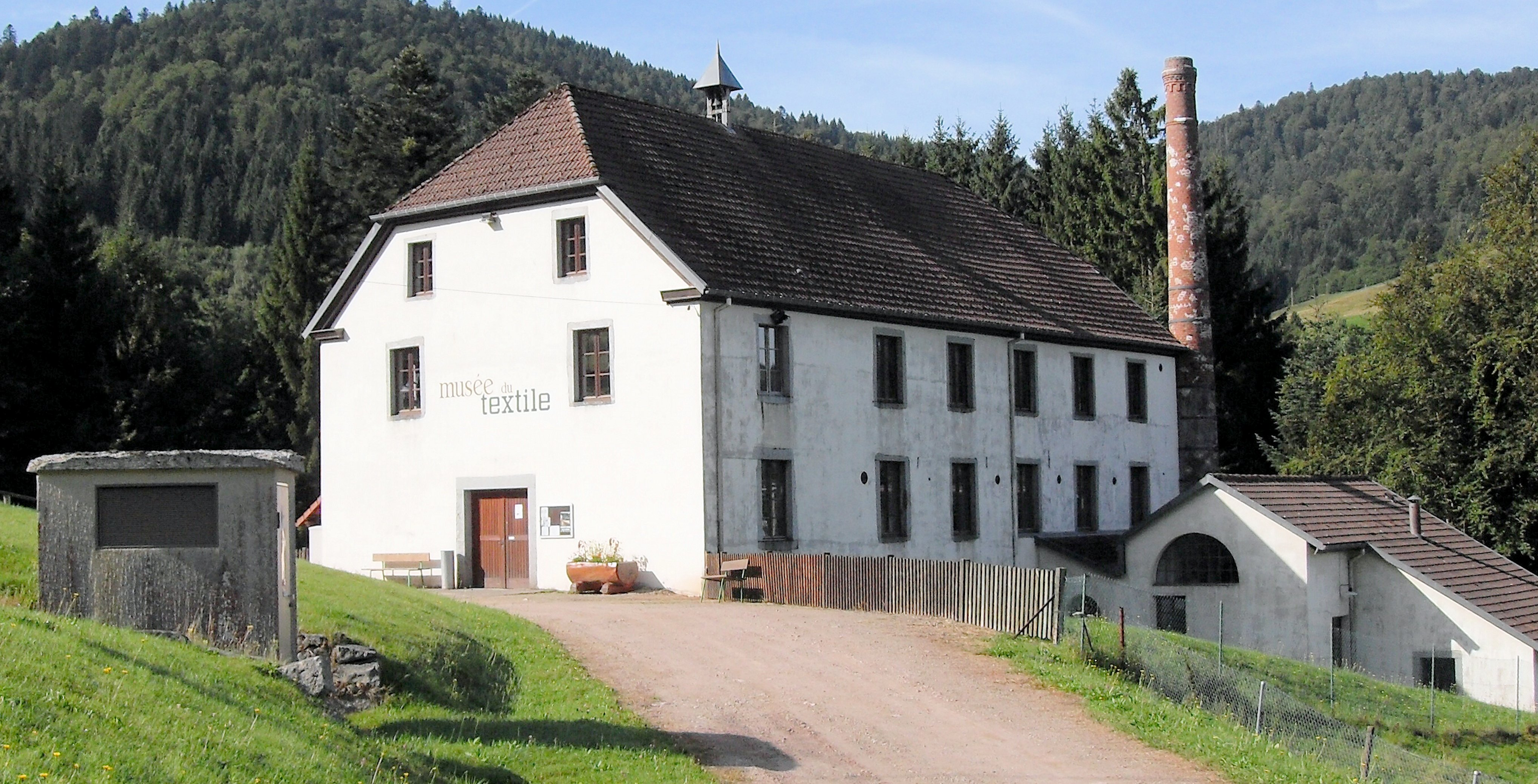 Musée du textile Ventron. Le Centre de Cultures Scientifiques, Technique et Industrielle (CCSTI) de Ventron, avec son musée textile des Vosges dans les murs d'un tissage construit en 1830, a été reconnu d’intérêt régional par la Région Lorraine le 7 mai 1987